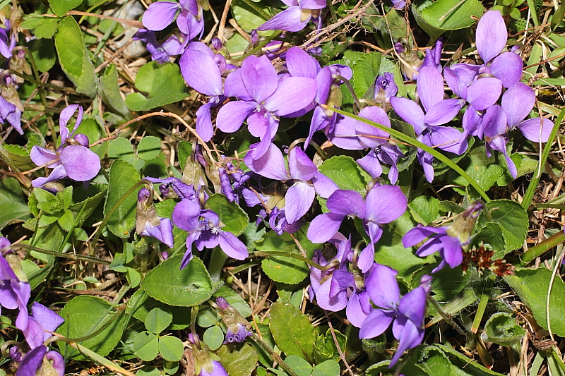 Veilchen aus der Steiermark